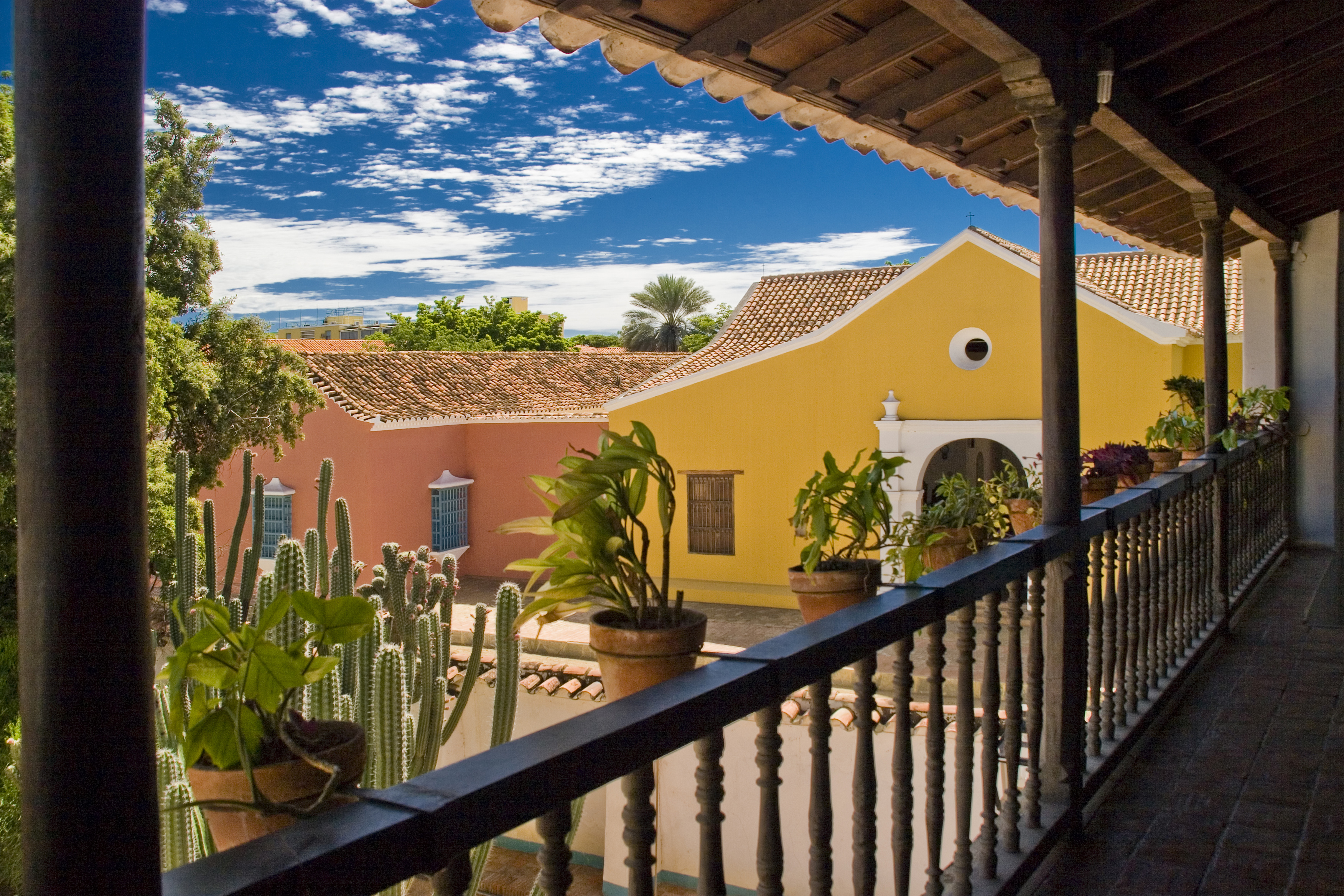 Casco central Santa Ana de Coro, estado Falcon, Venezuela